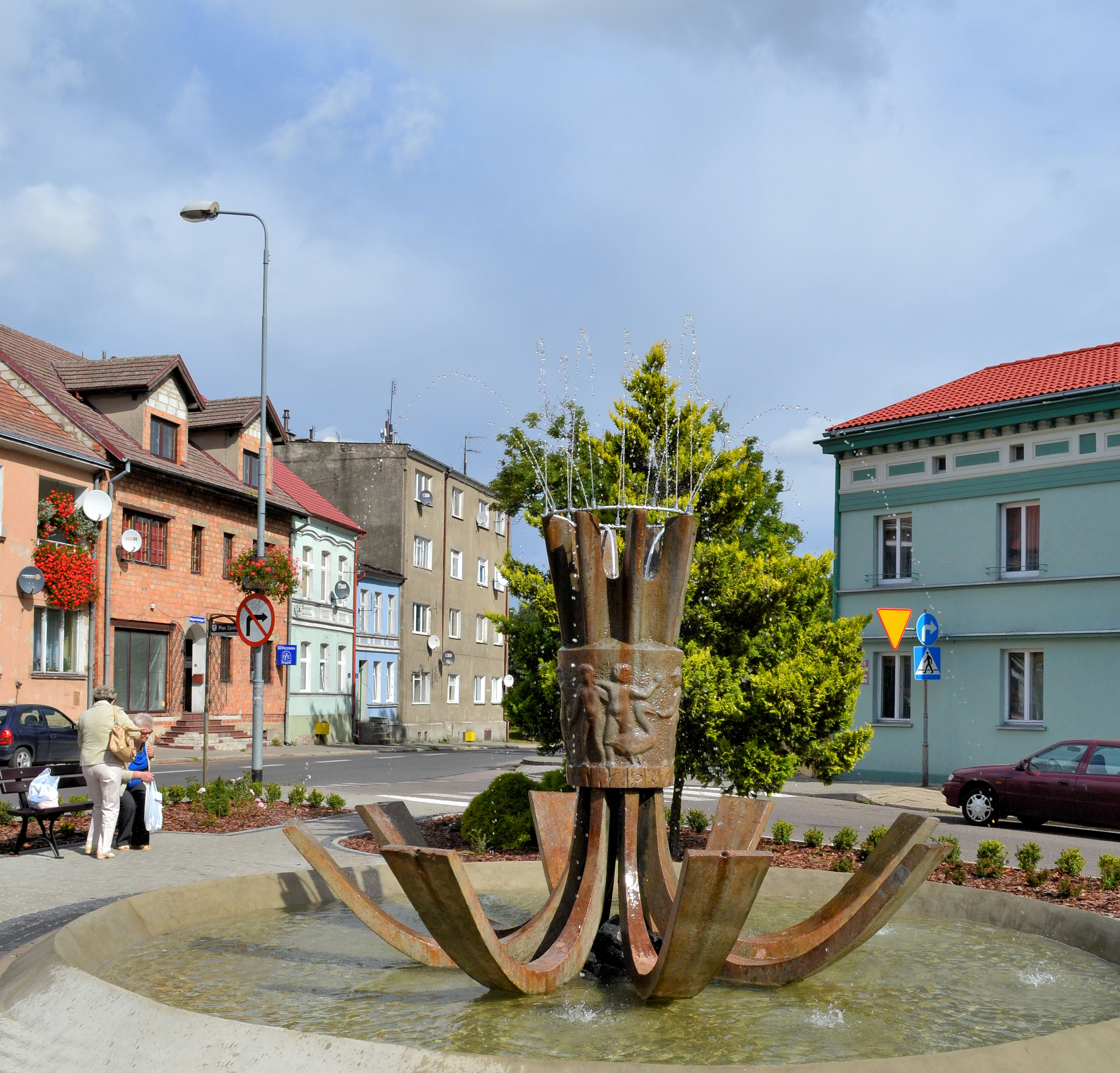 Fontanna na Placu Zjednoczenia w Trzebiatowie